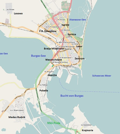 Zentrale Viertel von Burgas, Bulgarien This map may be incomplete, and may contain errors. Don't rely solely on it for navigation.